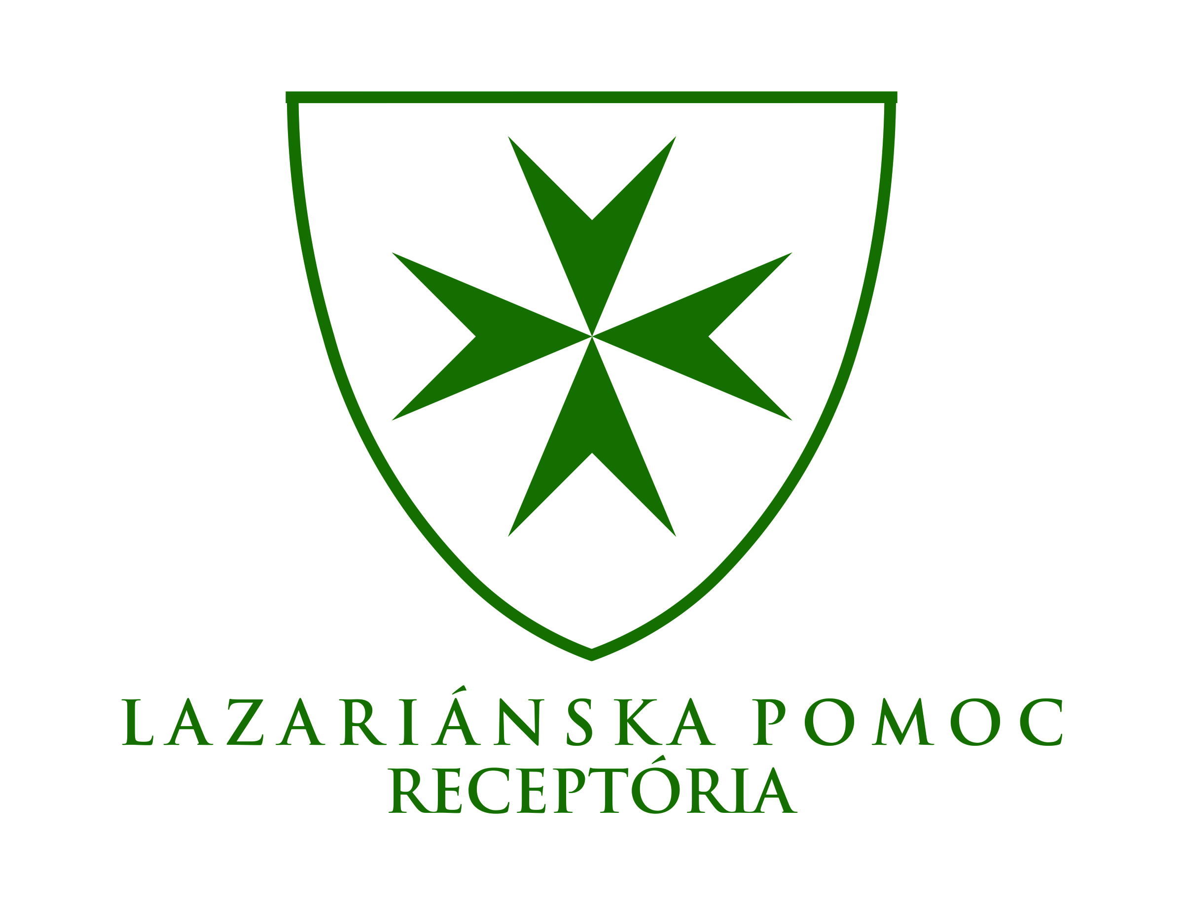 Logo Lazariánskej pomoci - Slovensko